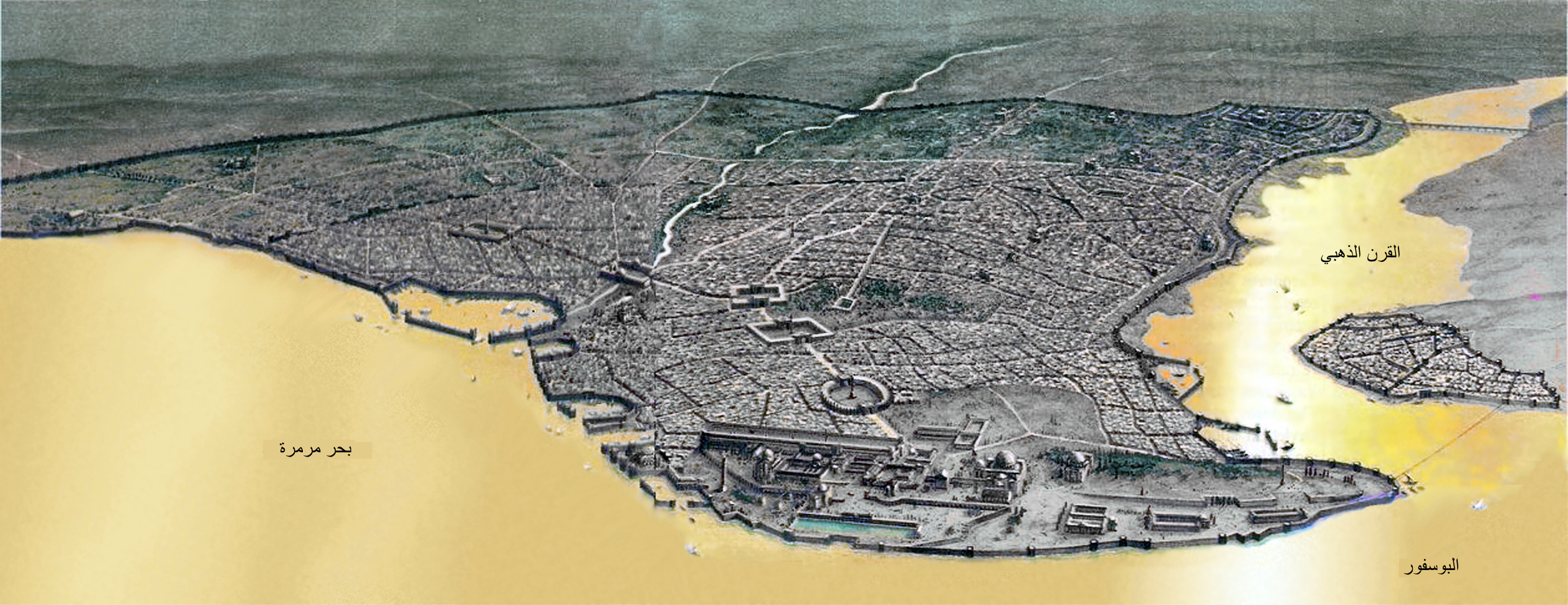 القُسطنطينيَّة كما كانت تبدو في العهد البيزنطي.